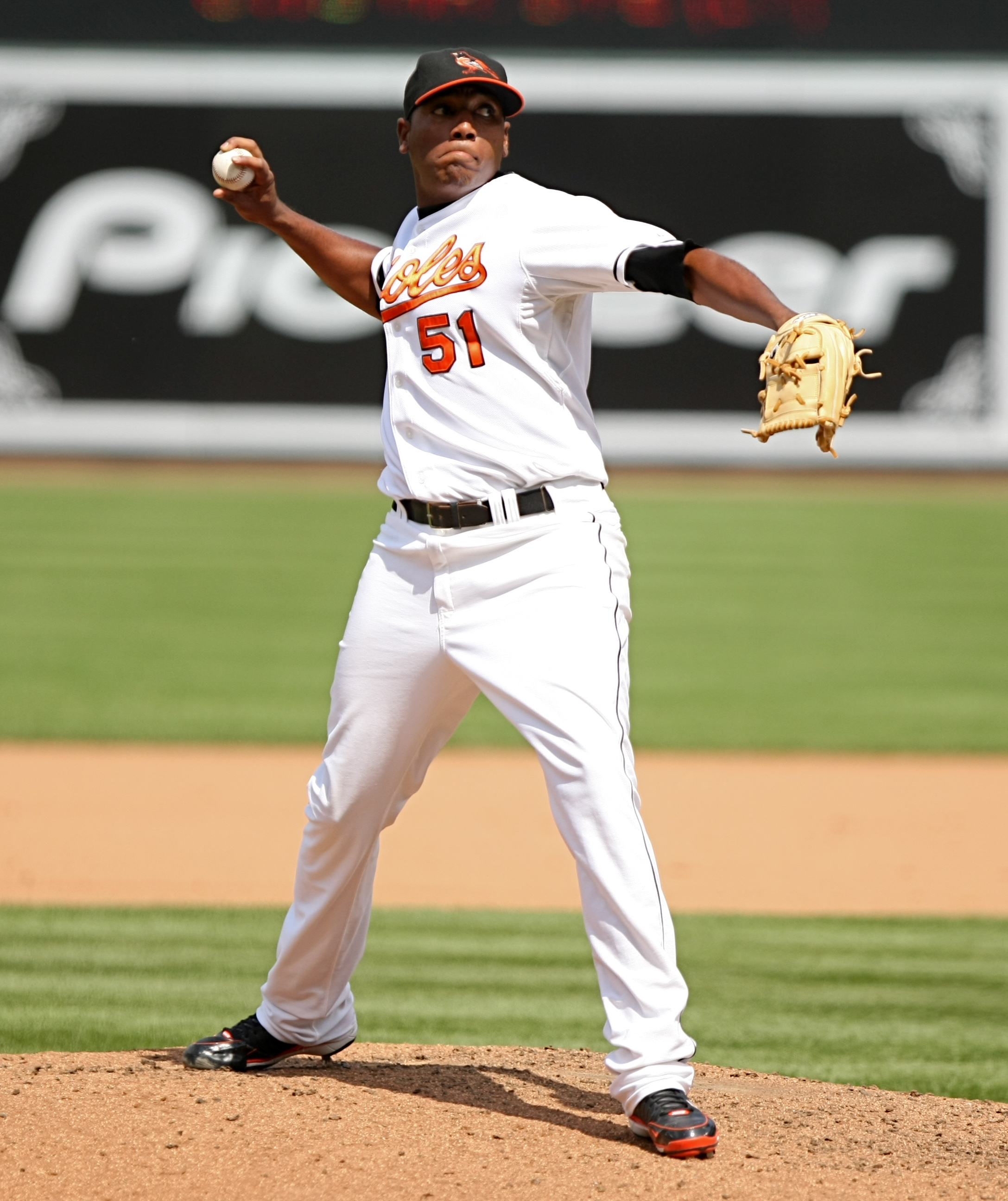 Randor Bierd